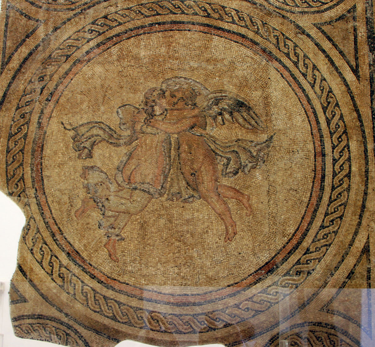 Eros et Psyché. Mosaïque d'époque romaine. Alcazar de Cordoue (Espagne)